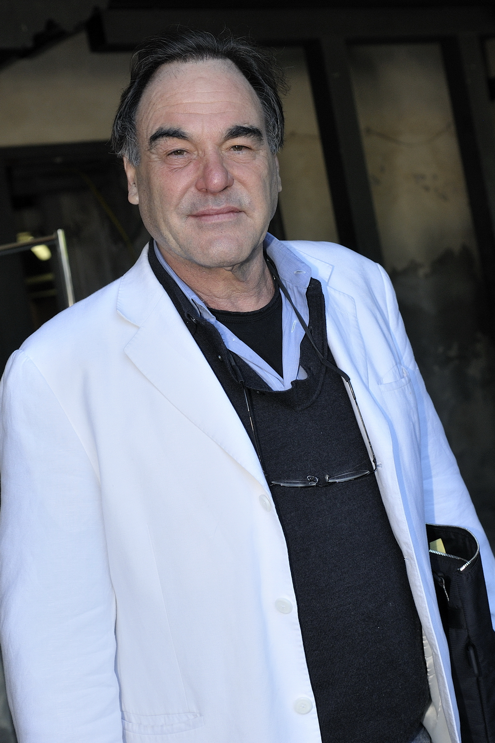 66ème Festival du Cinéma de Venise (Mostra), 5ème jour (06/09/2009) Oliver Stone, le réalisateur